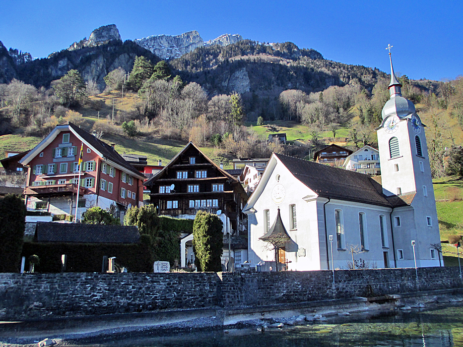 Bauen UR mit der Iddakirche